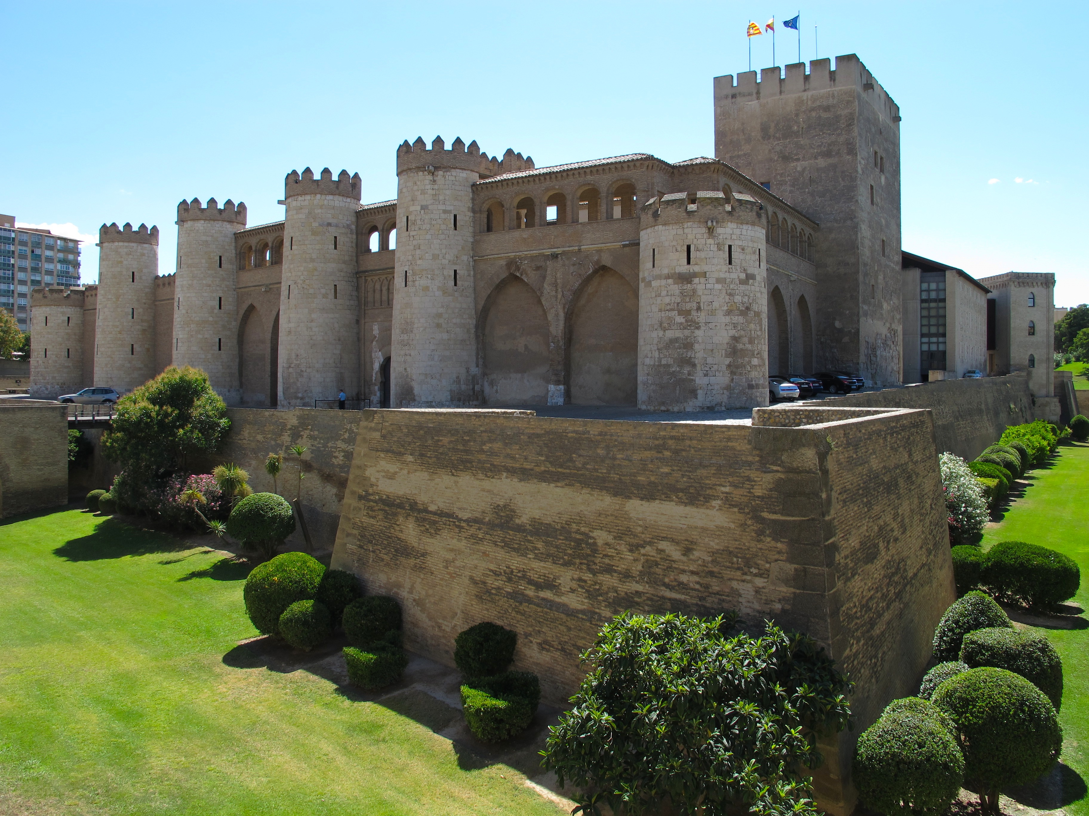 Zaragoza (Aragon, Spanien): Stadtpalast "La Aljafería", Gesamtansicht von Nordosten, der eckige Turm ist der "Turm des Troubadours"